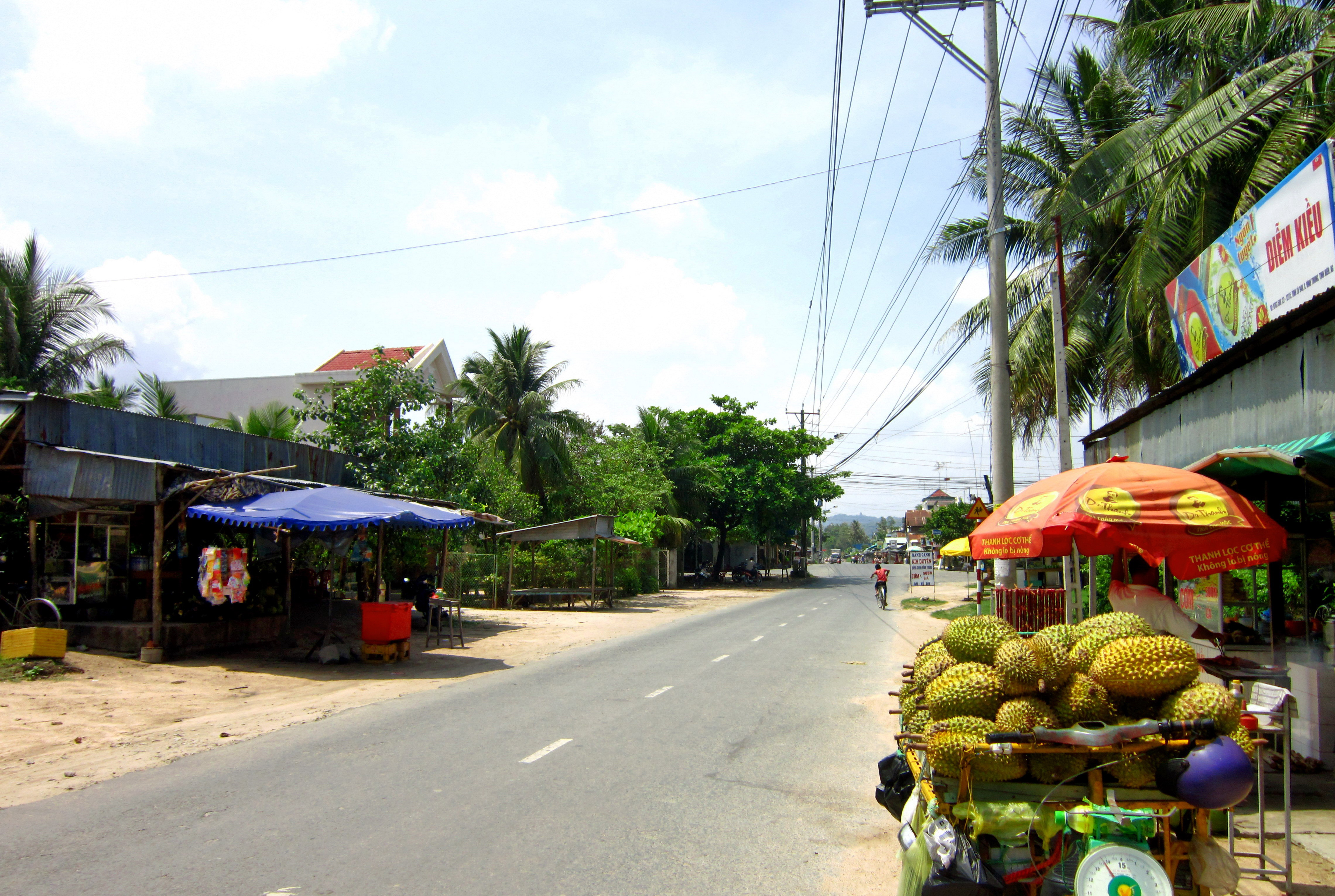 Trên Quốc lộ 91, đoạn đi qua xã Vĩnh Trung, thuộc huyện Tịnh Biên, tỉnh An Giang, Việt Nam.